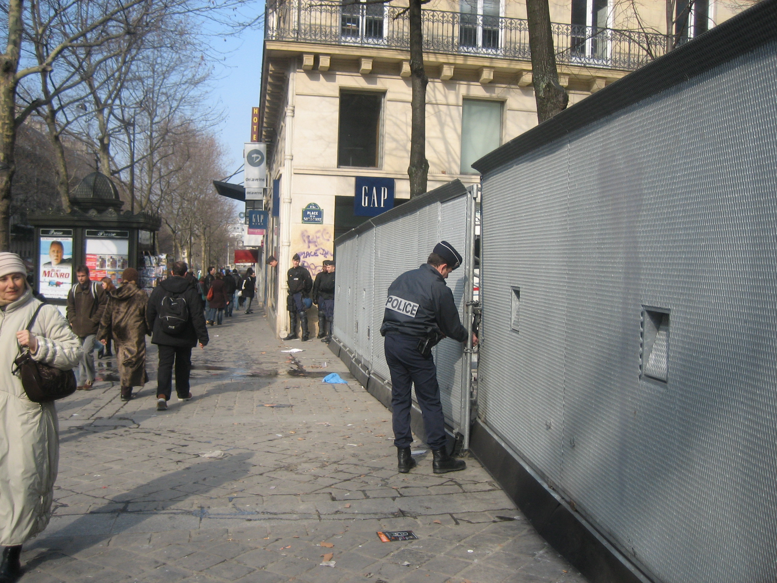 Gendarme an der Absperrung des Platzes vor der Sorbonne.